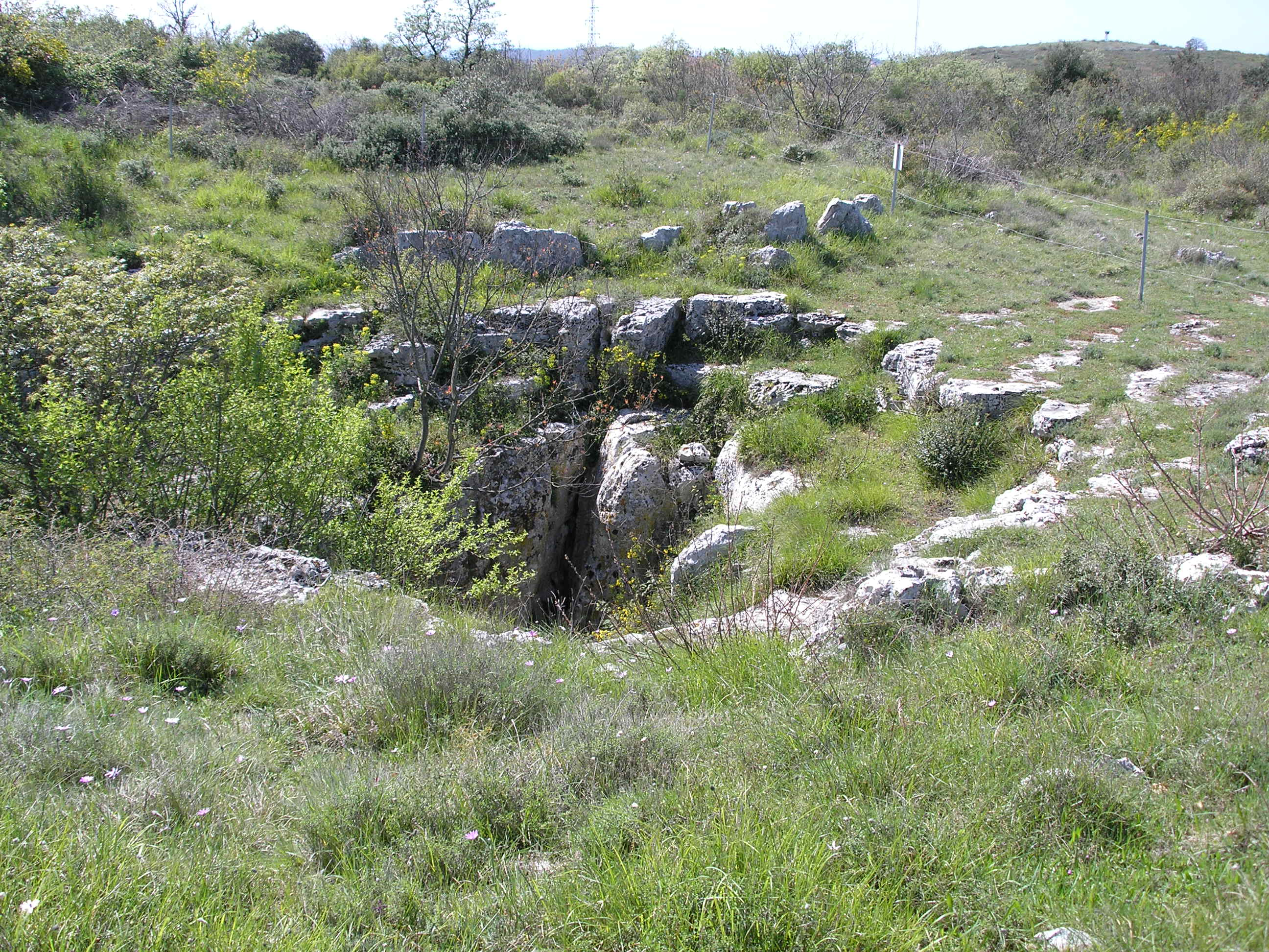 Monkodonja (Moncodogno) archaeological site in Istria